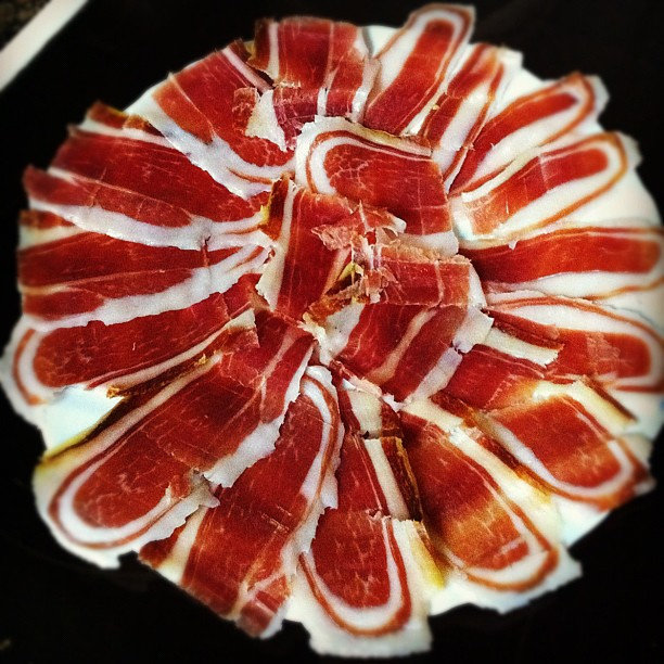 Plato de jamón.